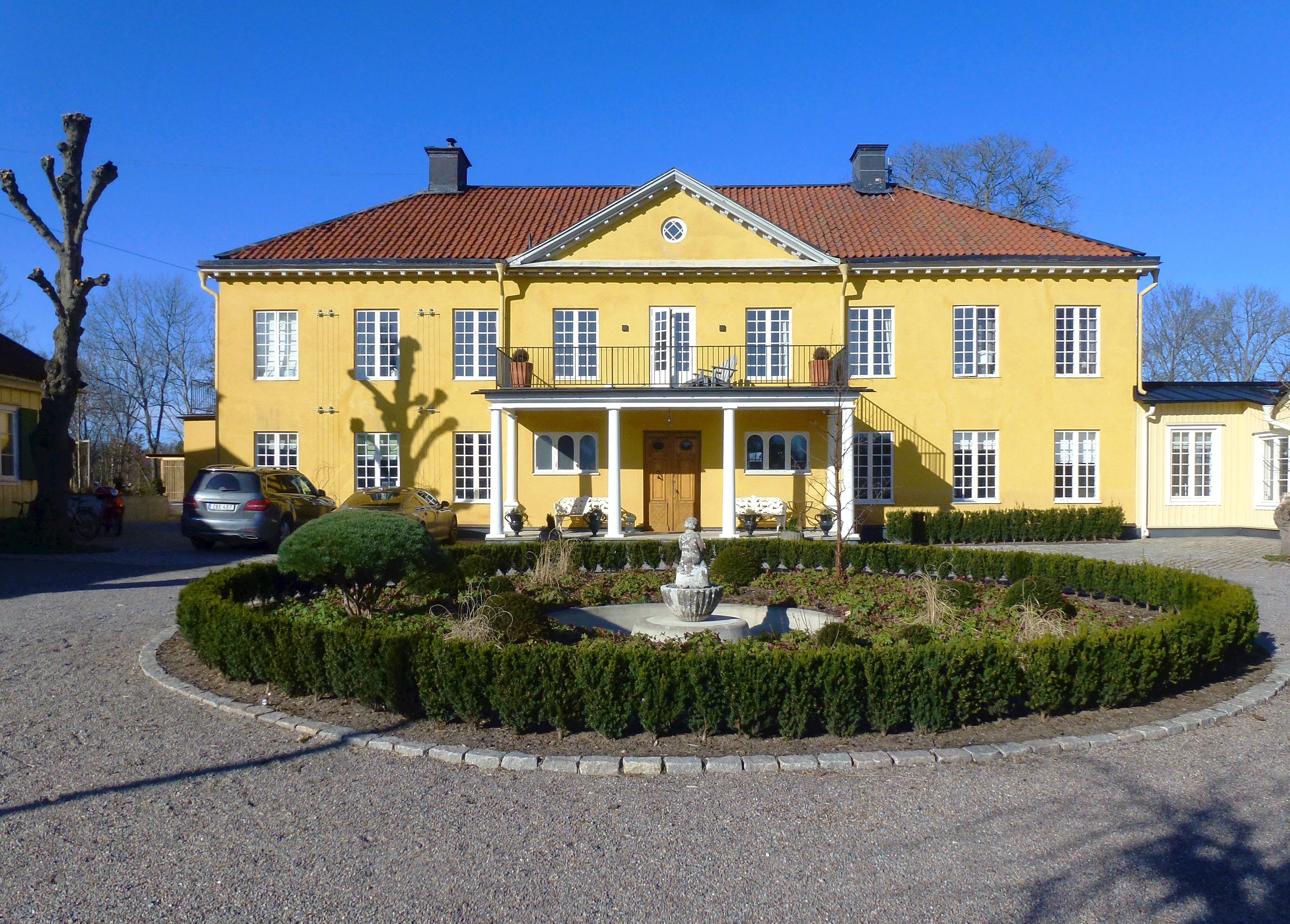 Hersbyholms gård även Hersby gård, huvudbyggnad